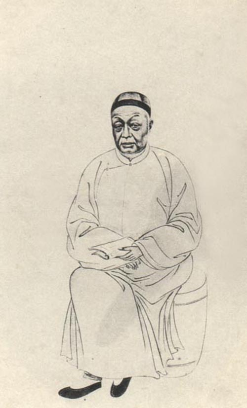 清代学者。Yang Wenhui